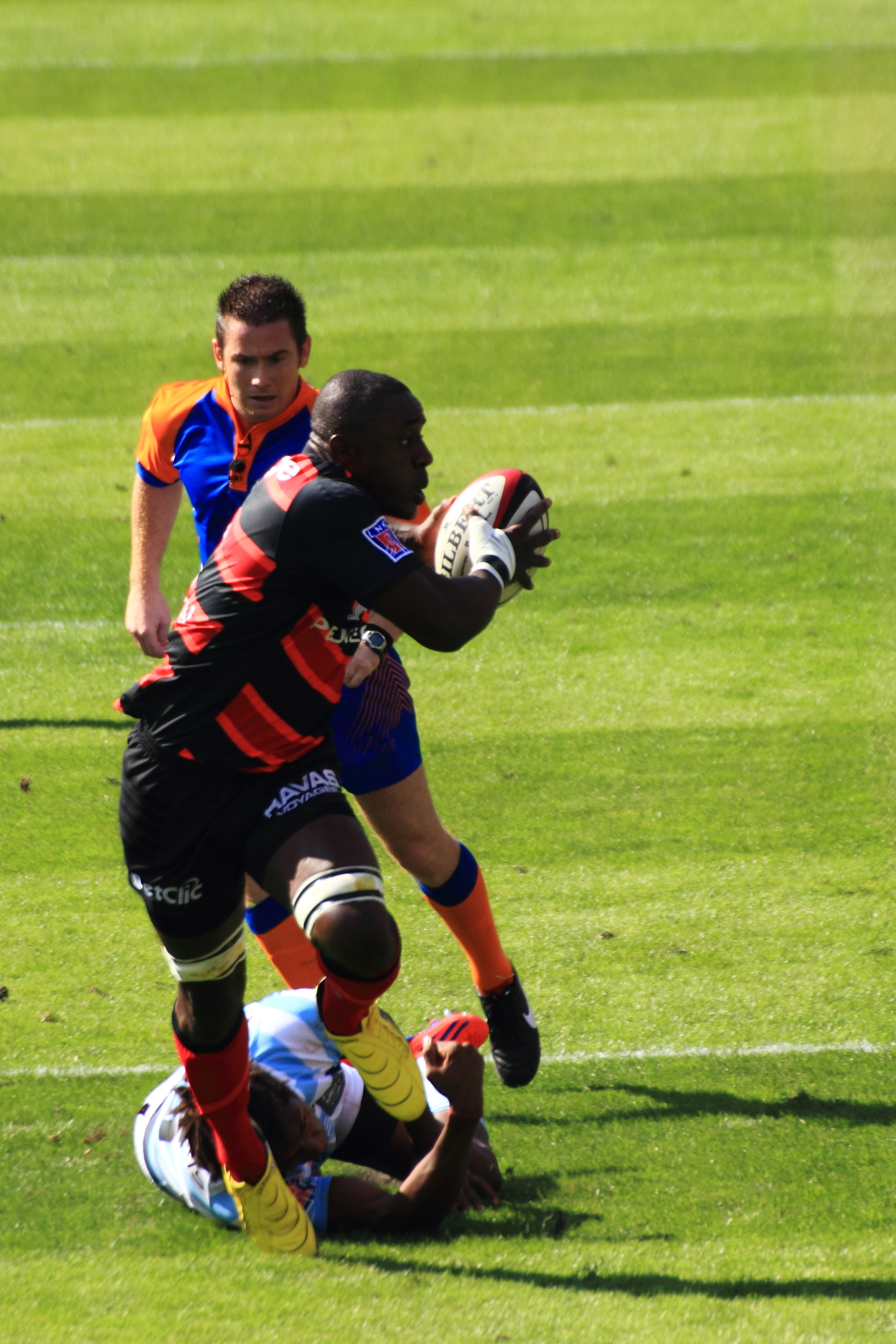 Après avoir échappé au plaquage de Fall, Nyanga évite la cuillère